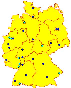 Sinologie- und Chinesisch-Studiengänge an Universitäten (dunkelblau) und Hochschulen (türkis) in Deutschland, Stand 2004.